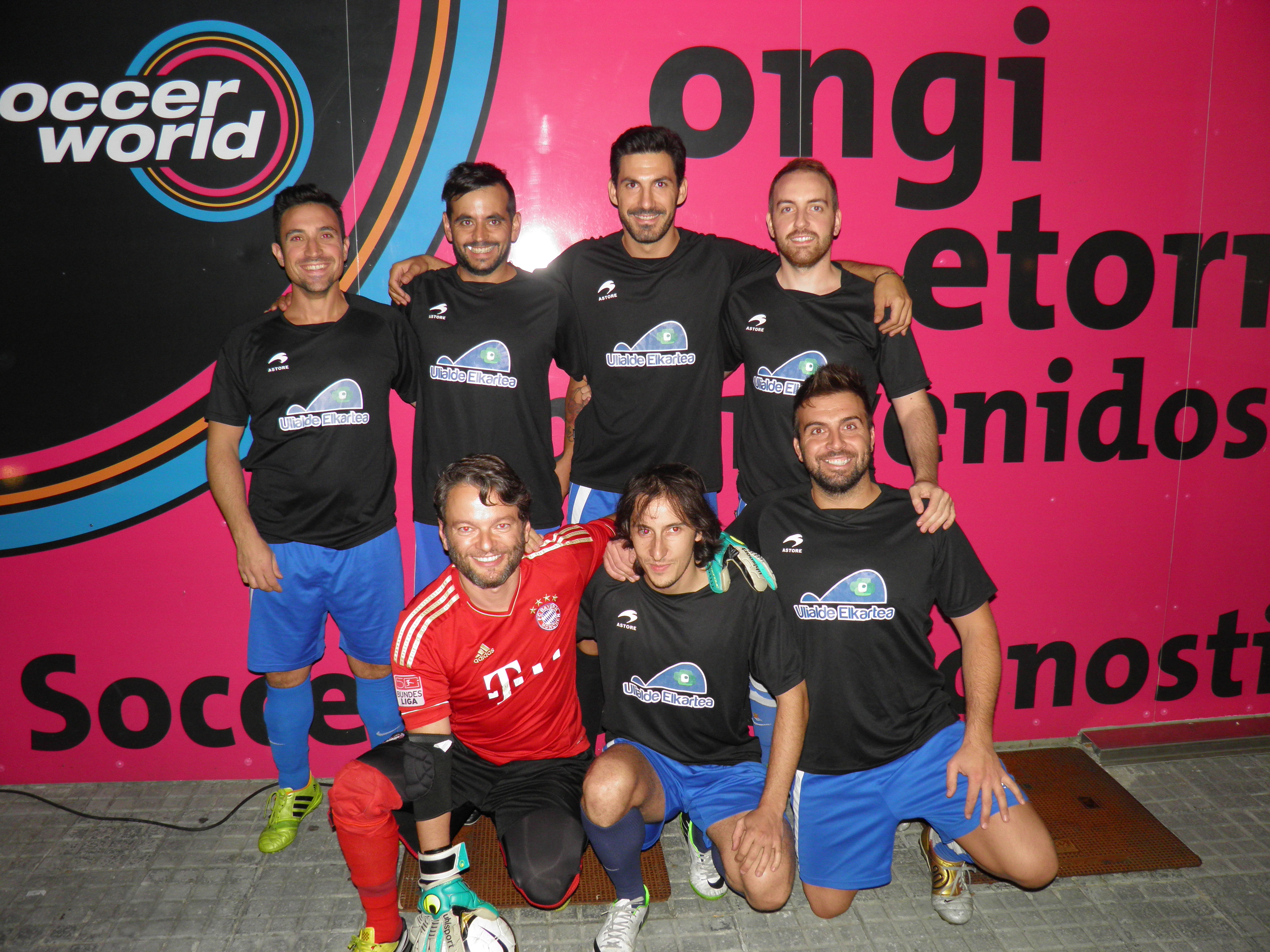 Equipo de futbol Ulialde